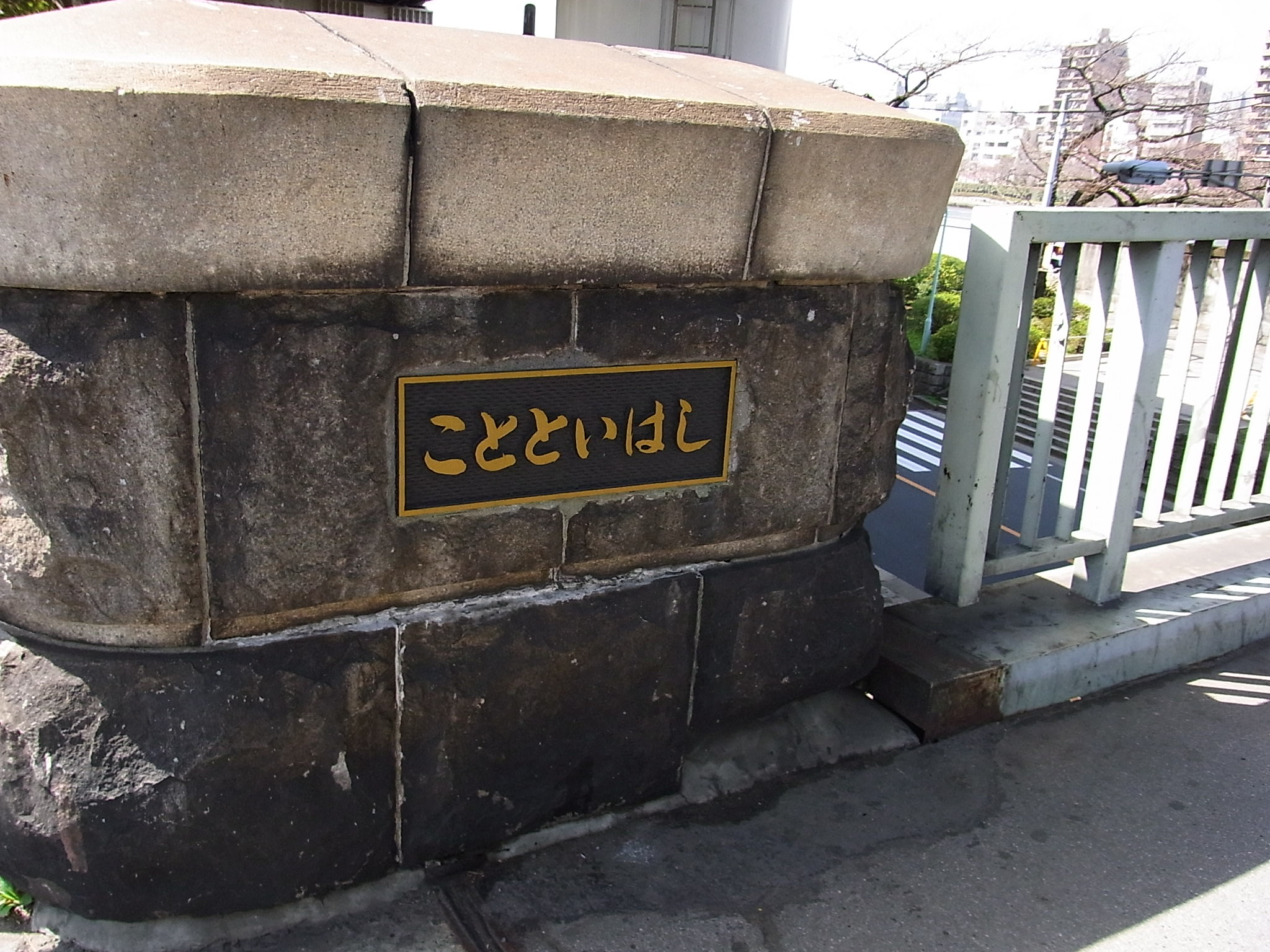 隅田川の言問橋